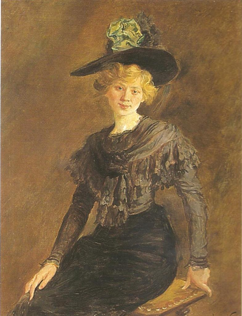 Catalan: Carlota Vidal, germana de la pintora Lluïsa Vidallabel QS:Lca,"Carlota Vidal, germana de la pintora Lluïsa Vidal"